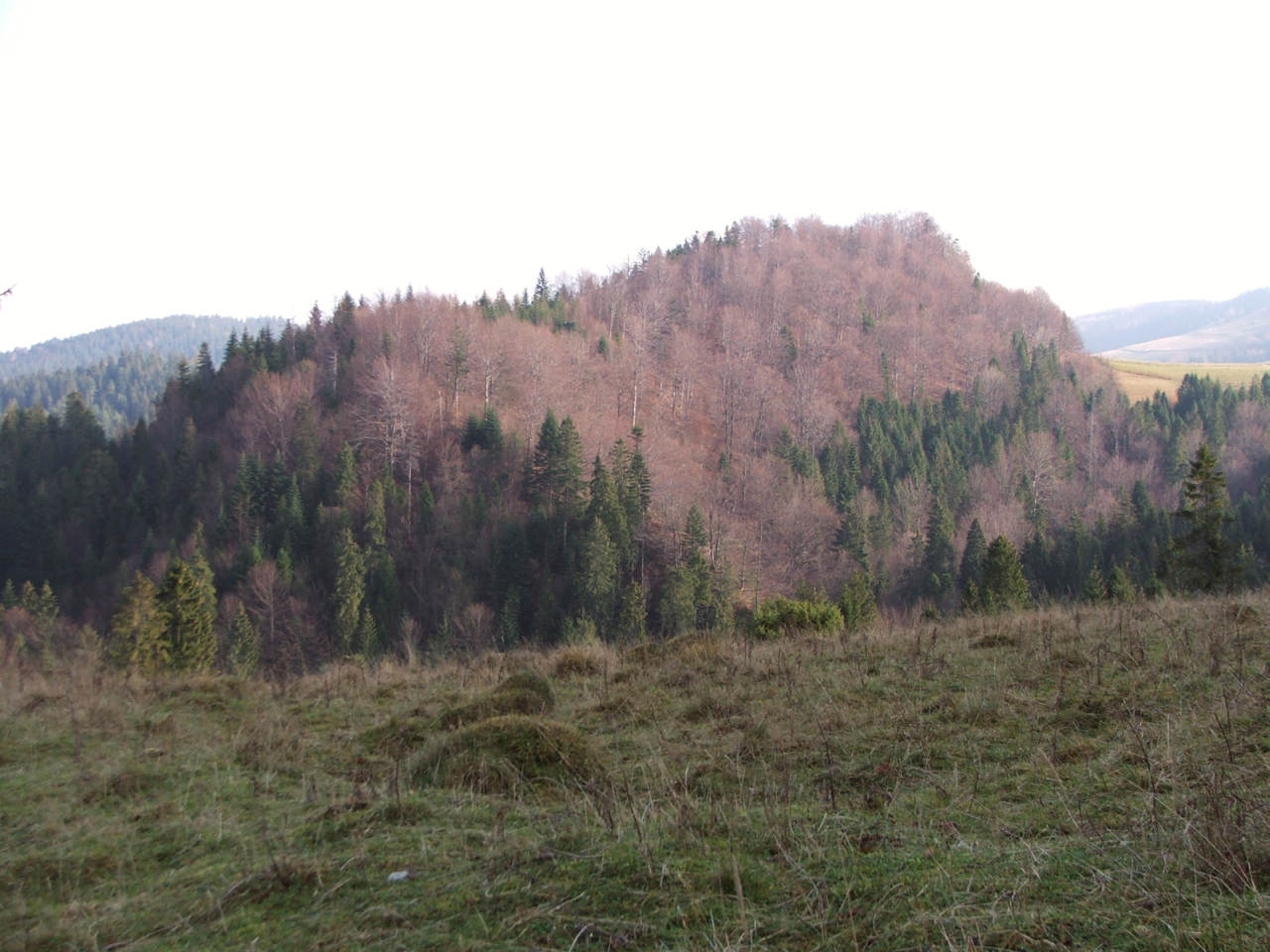 Szczyt Homole (Małe Pieniny))